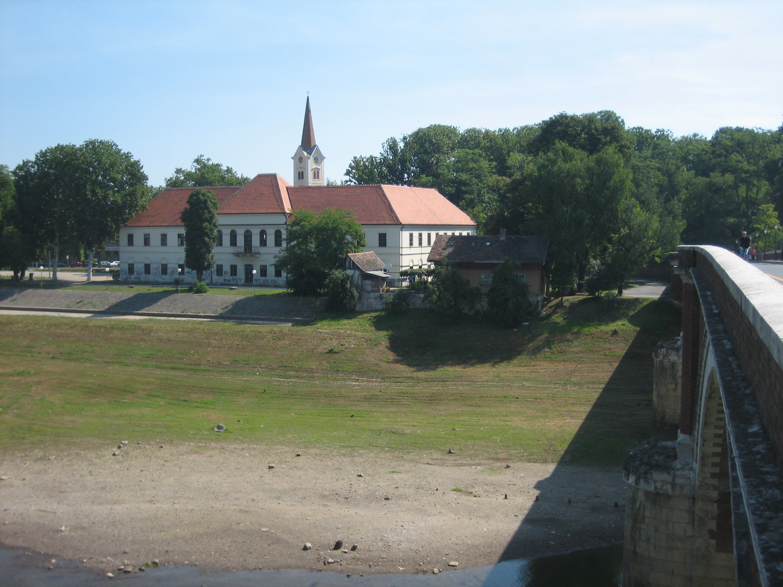 "Veliki Kaptol" building in Sisak, Croatia. 19th cent. / Zgrada "Velikog Kaptola" u Sisku. 19. st.